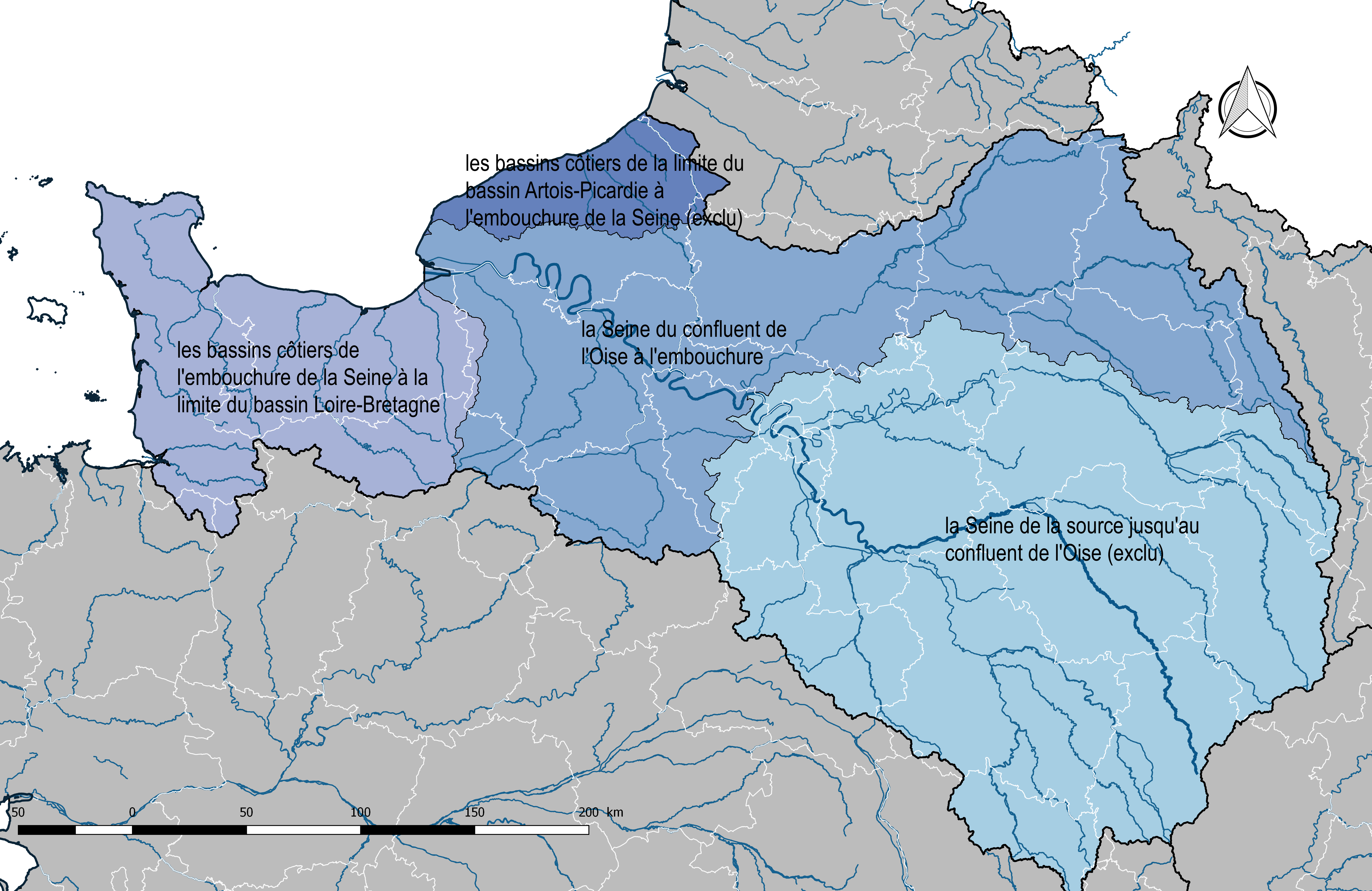 Carte du bassin hydrographique Seine-Normandie (France) et de son découpage en régions hydrographiques.